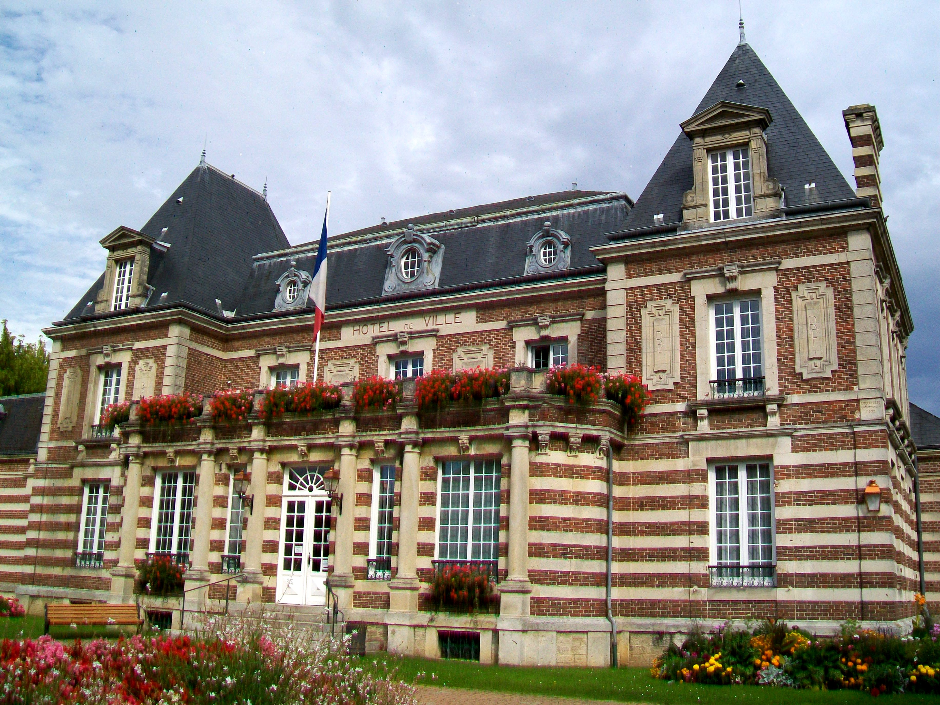 La façade principale ouest de l'Hôtel de ville.